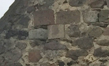 Nærbillede af skakbrætsten på Heckelberg kirkes Ø-gavl - det er den sten, der er mørk på midten